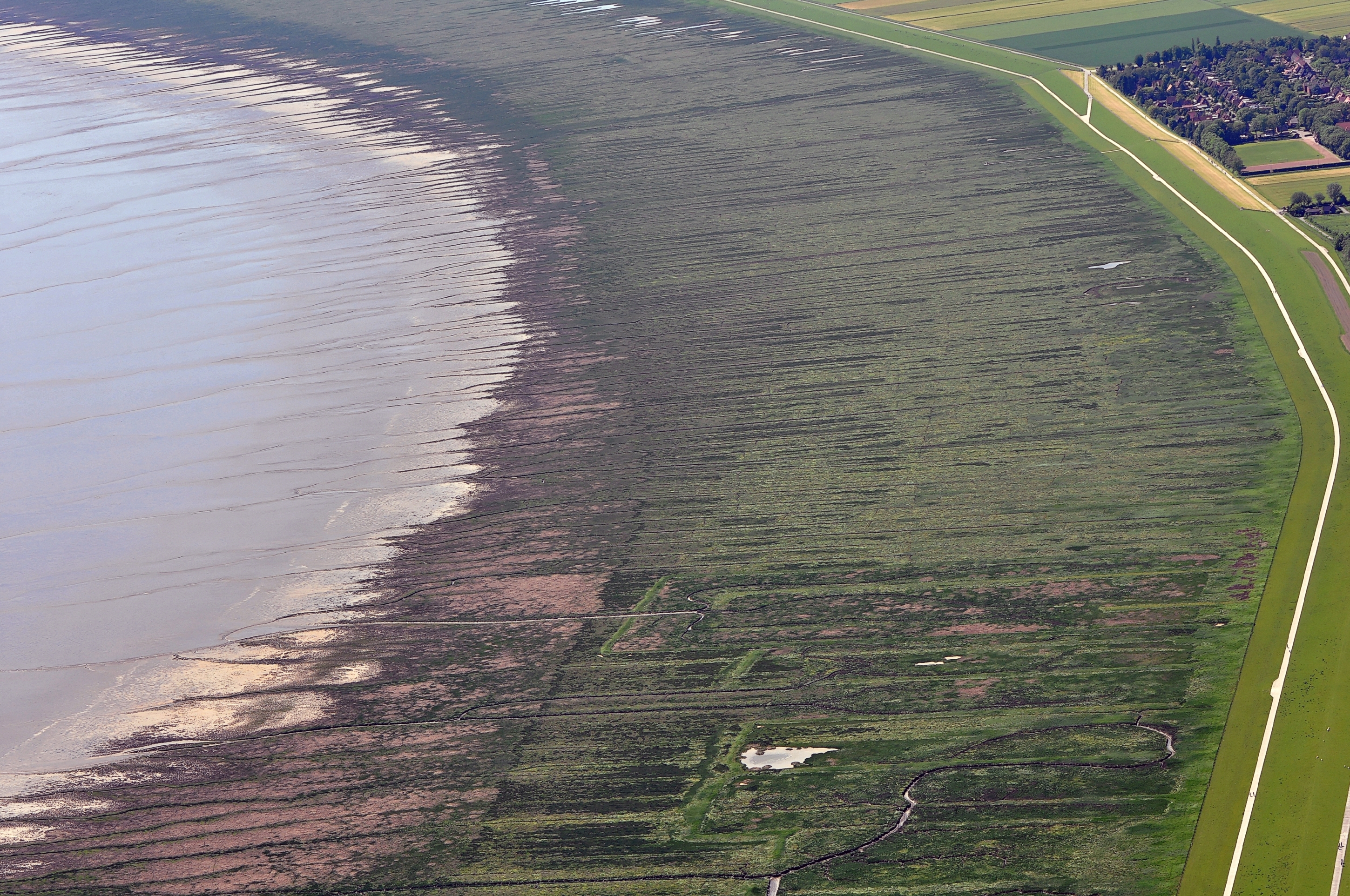 Luftbilder von der Nordseeküste 2012-05